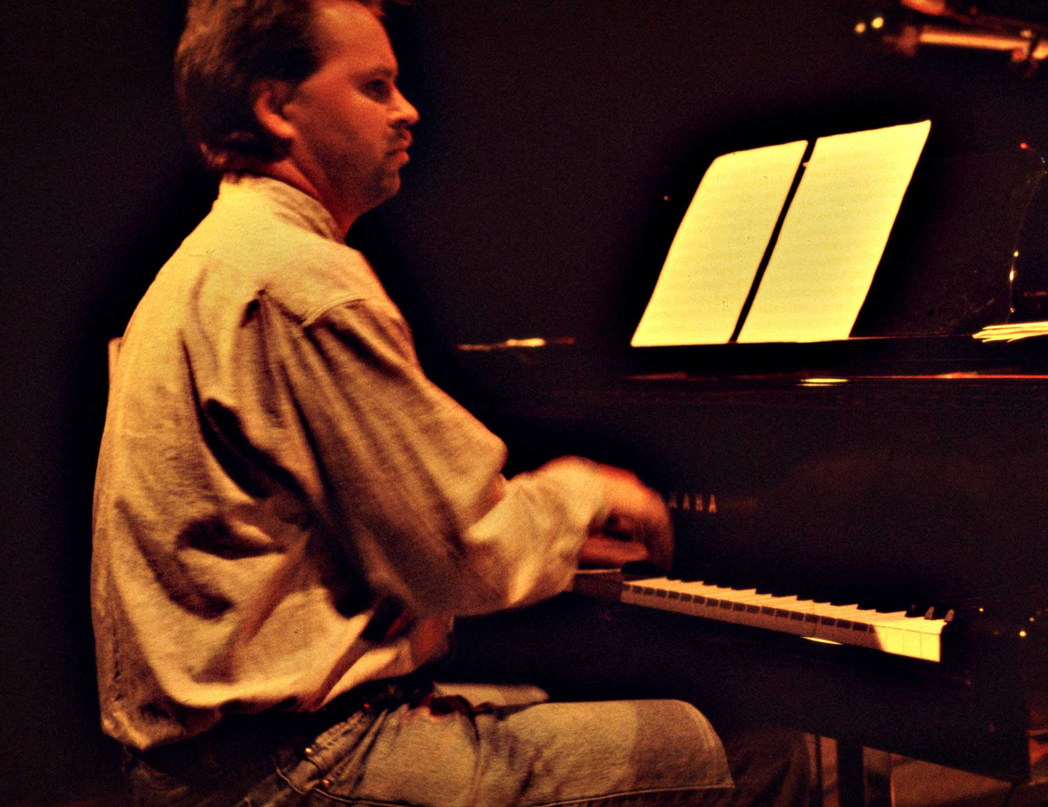 Pianisti Jarmo Savolainen Jumo Jazzklubilla Helsingissä 1993.